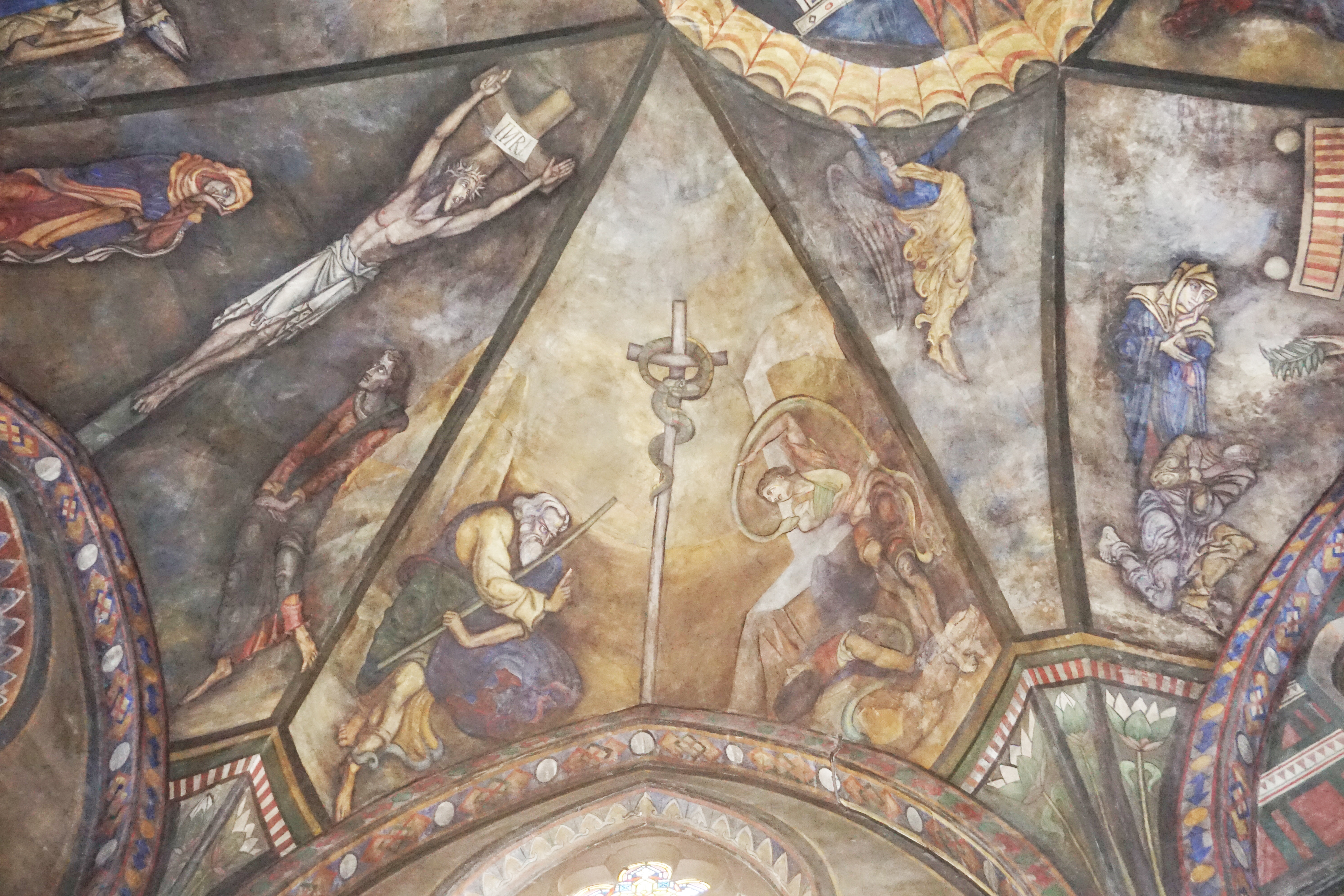 Gewelf Odulphuskerk in Bakhuizen